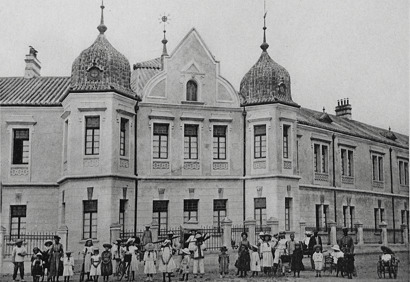 青岛圣心修道院